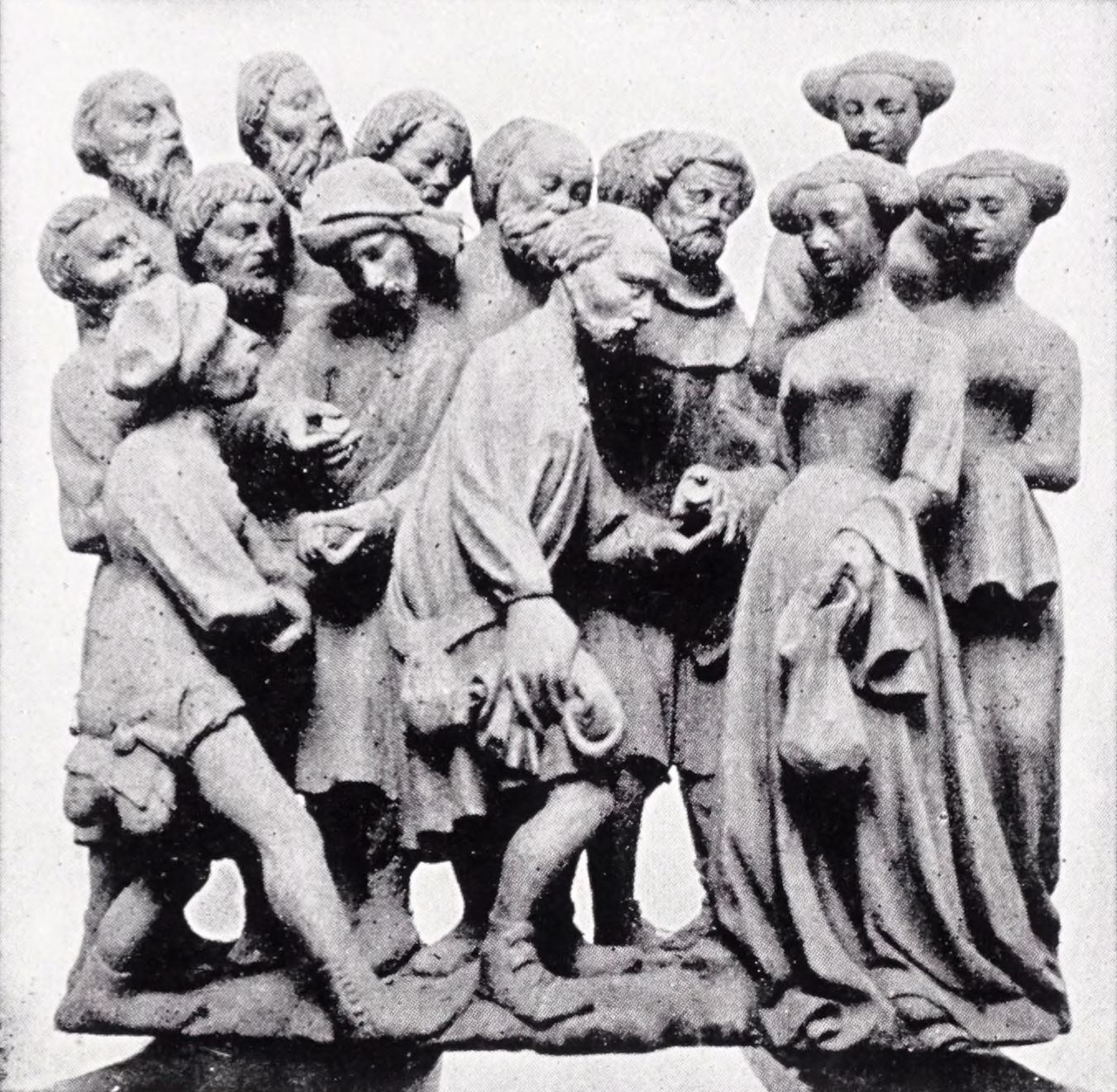 La paye des maçons. Fragment du Retable de Haekendover, près de Tirlemont. Groupe en bois. Fin du XIVe siècle.